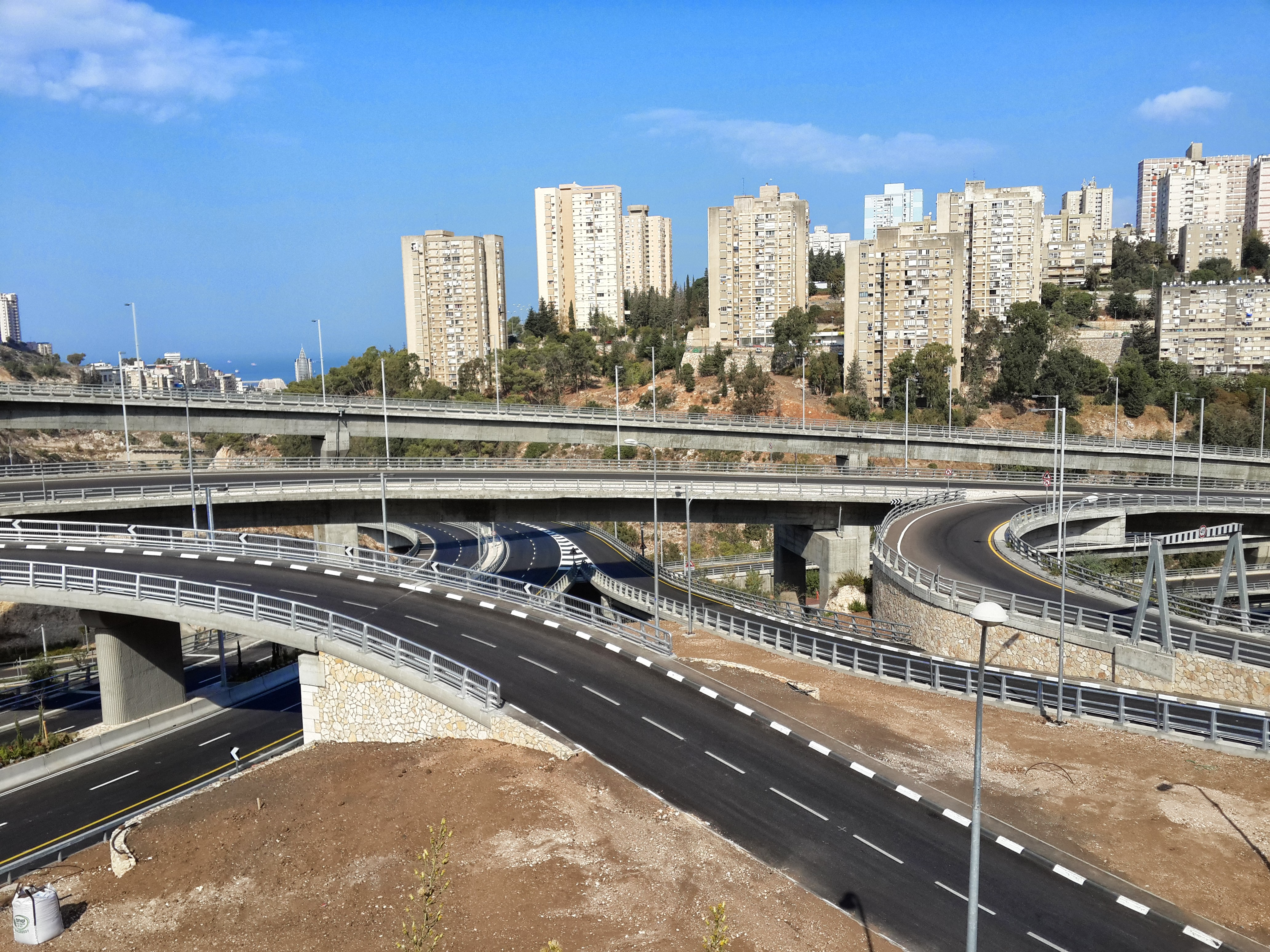 מחלף רופין בחיפה המקשר את העיר התחתית ומנהרות הכרמל עם שכונות נווה שאנן והכרמל. בחזית מימין לשמאל: כביש הגישה למנהרות הכרמל מכיוון מרכז זיו ונווה שאנן לכיוון הצ'ק פוסט, כביש הגישה לדרך נחל גיבורים לכיוון העיר התחתית, כביש הגישה לגרנד קניון, כביש נחל גיבורים מכיוון שכונות רוממה. מוצא מנהרות הכרמל מכיוון הצ'ק פוסט (הגשר הארוך שבמרכז התמונה), כביש נחל גיבורים (מתחתיו), כביש מנהרות הכרמל (בתחתית הוואדי). ברקע התמונה ניתן ברבי הקומות של שכונת יזרעאליה, שכונת הדר ורוממה, ובמגדל הטיל שממוקם בקריית הממשלה שבעיר התחתית.